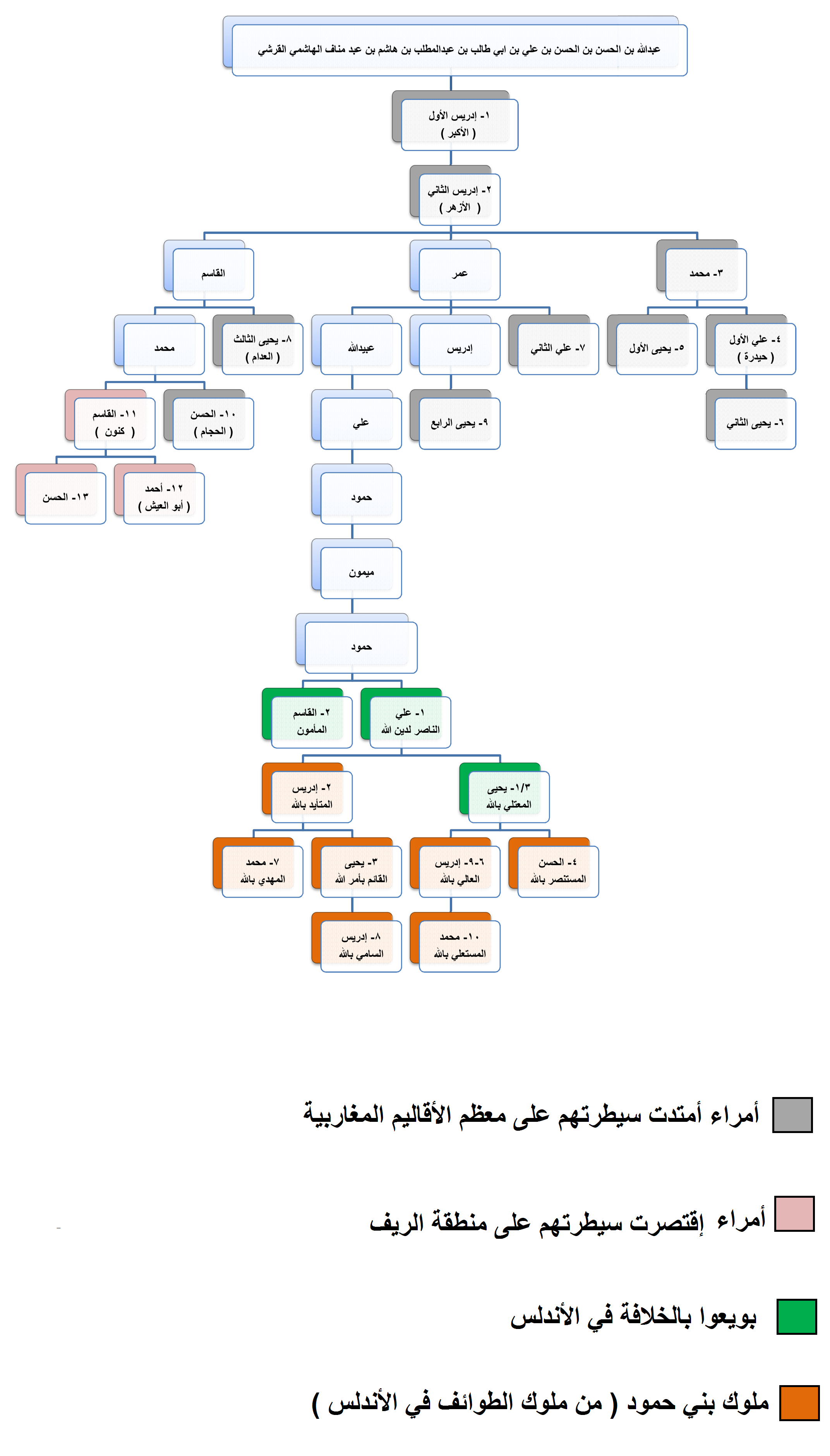 أمراء و ملوك و خلفاء العائلة الادريسية